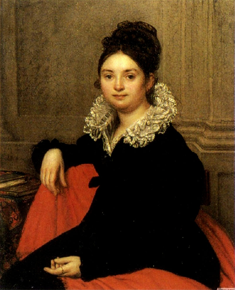 Портрет неизвестной с красной шалью (портрет Бутовской, супруги Ивана Григорьевича Бутовского)